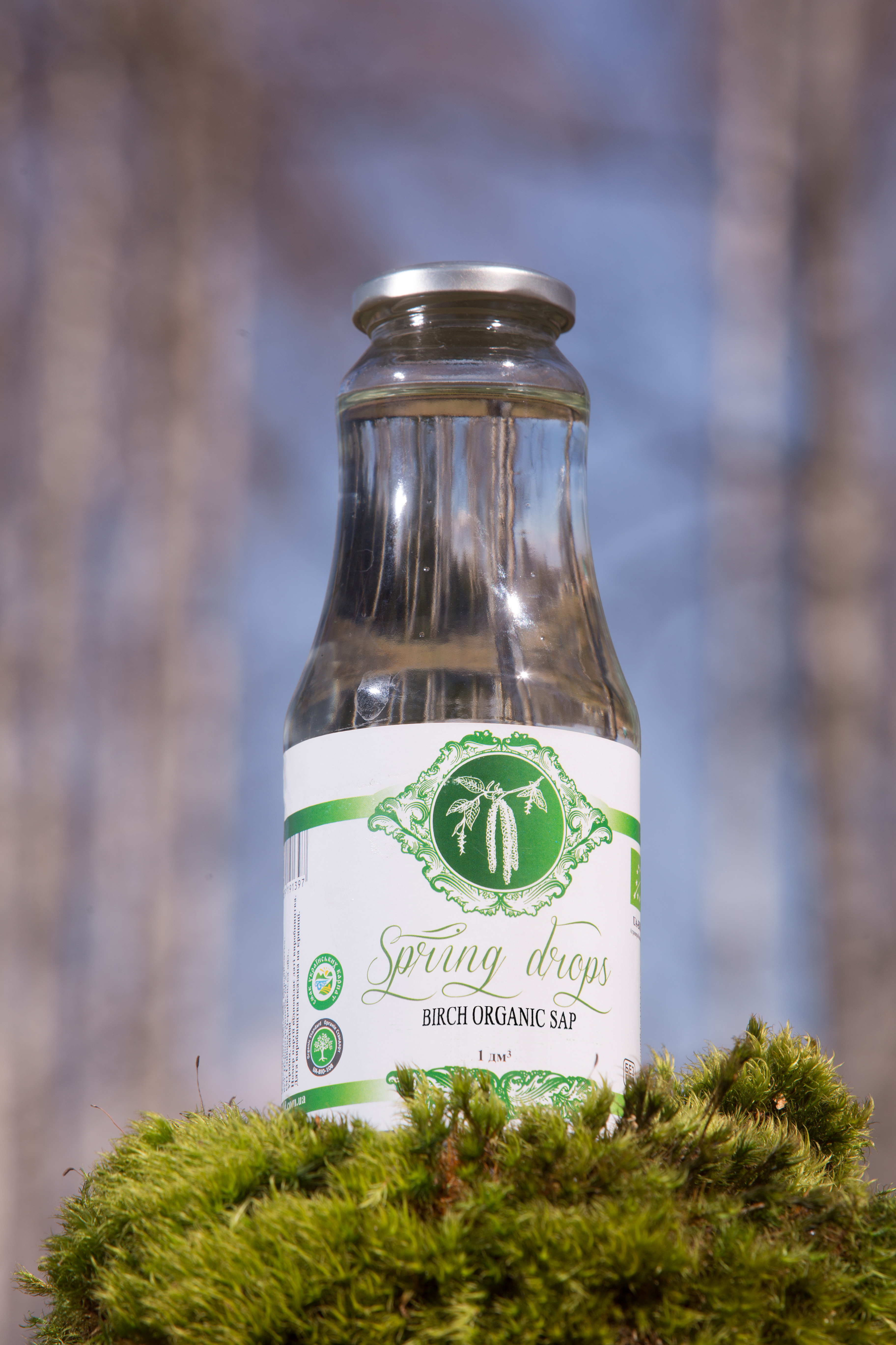 Органический березовый сок Liluck LLC